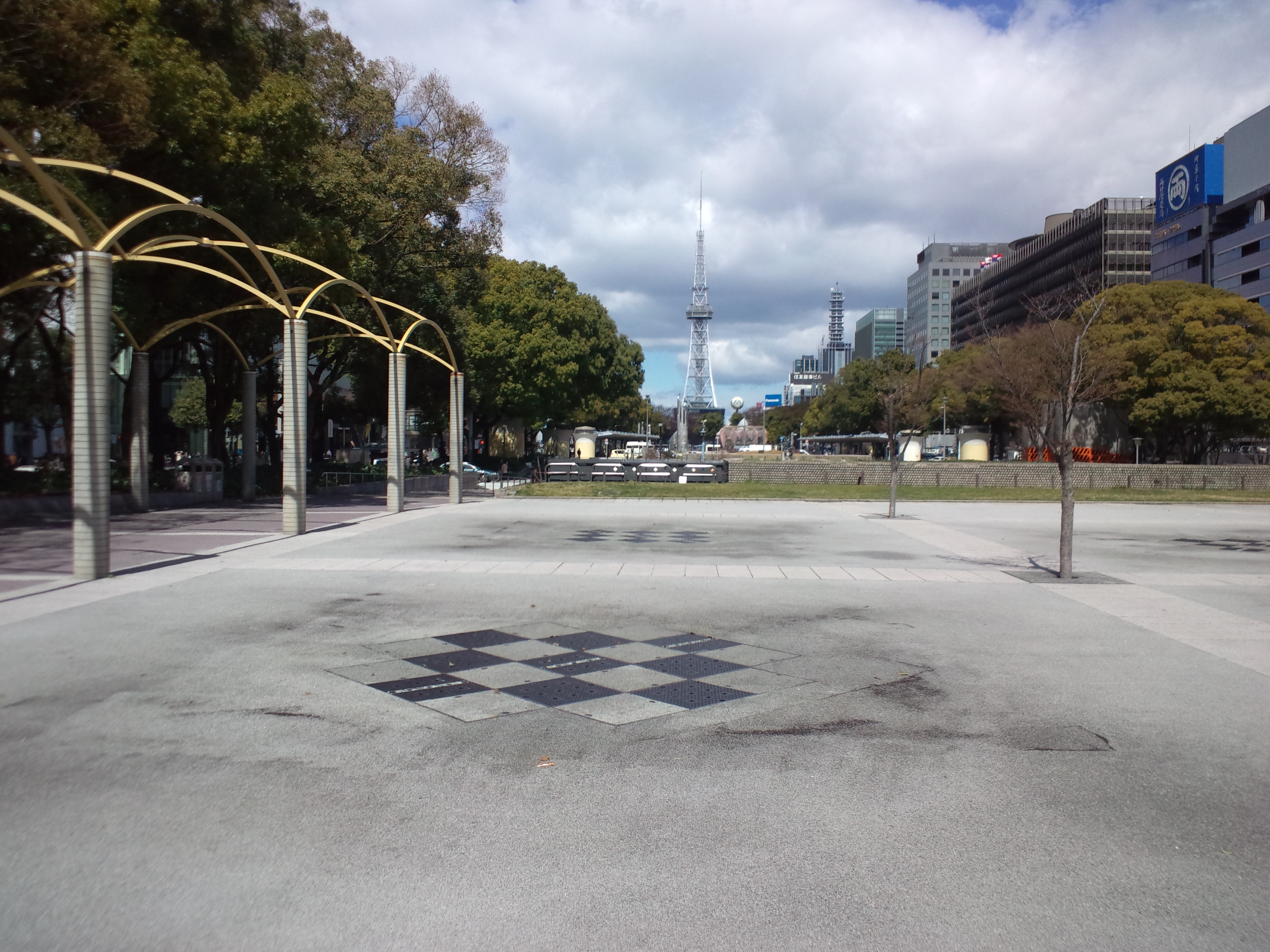 久屋大通 遠景